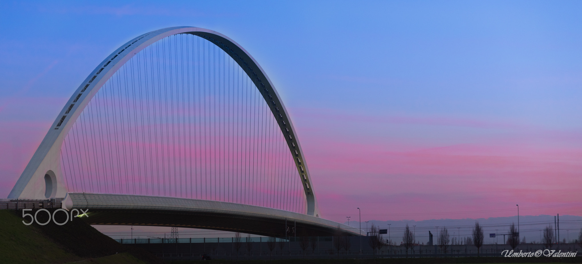 500px provided description: Calatrava [#sky ,#italy ,#landscapes ,#italia ,#cielo ,#natura ,#paesaggio ,#Emilia Romagna]